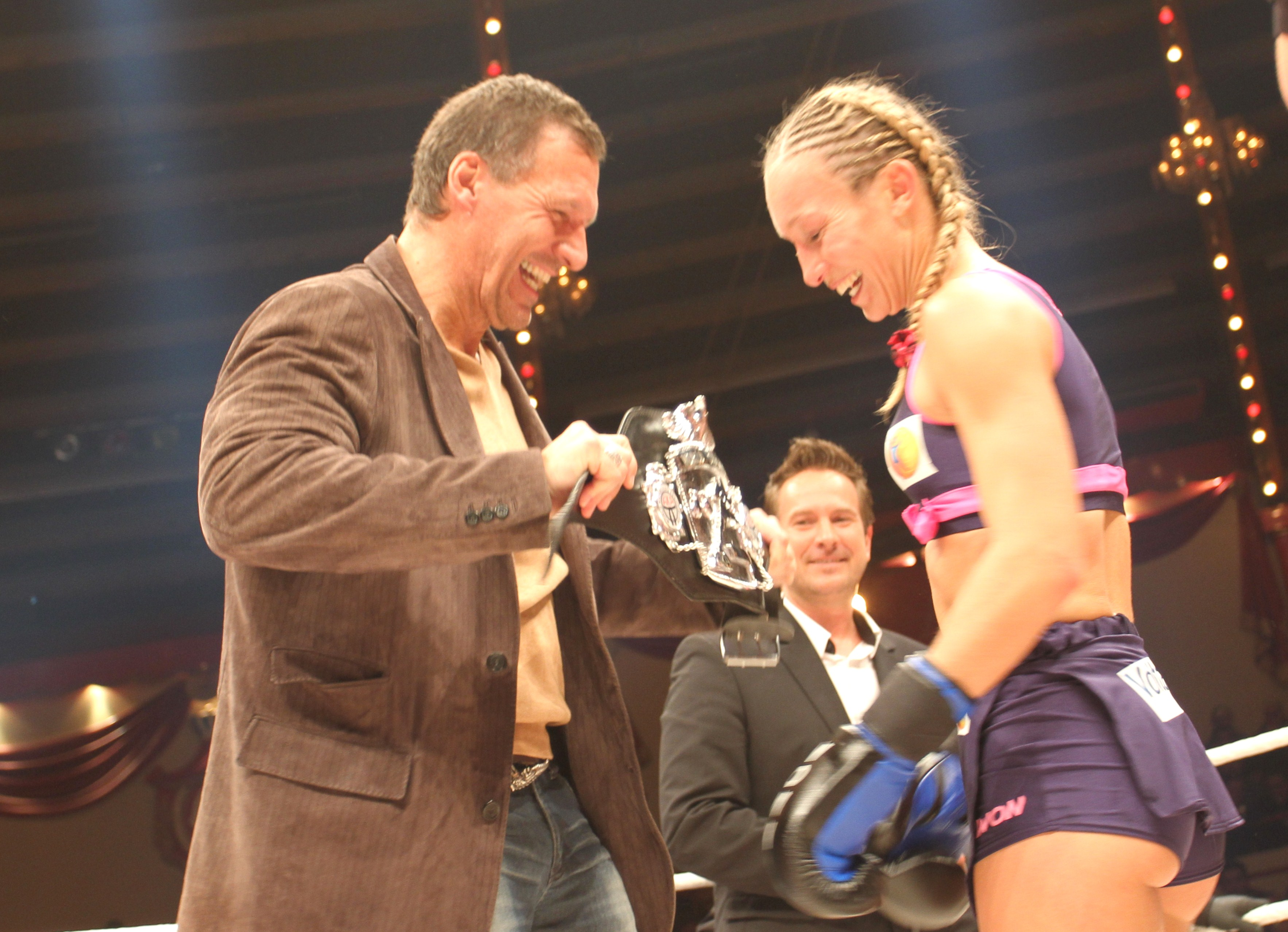 WM 2012 Ralf Möller (Gladiator) mit Christine Theiss